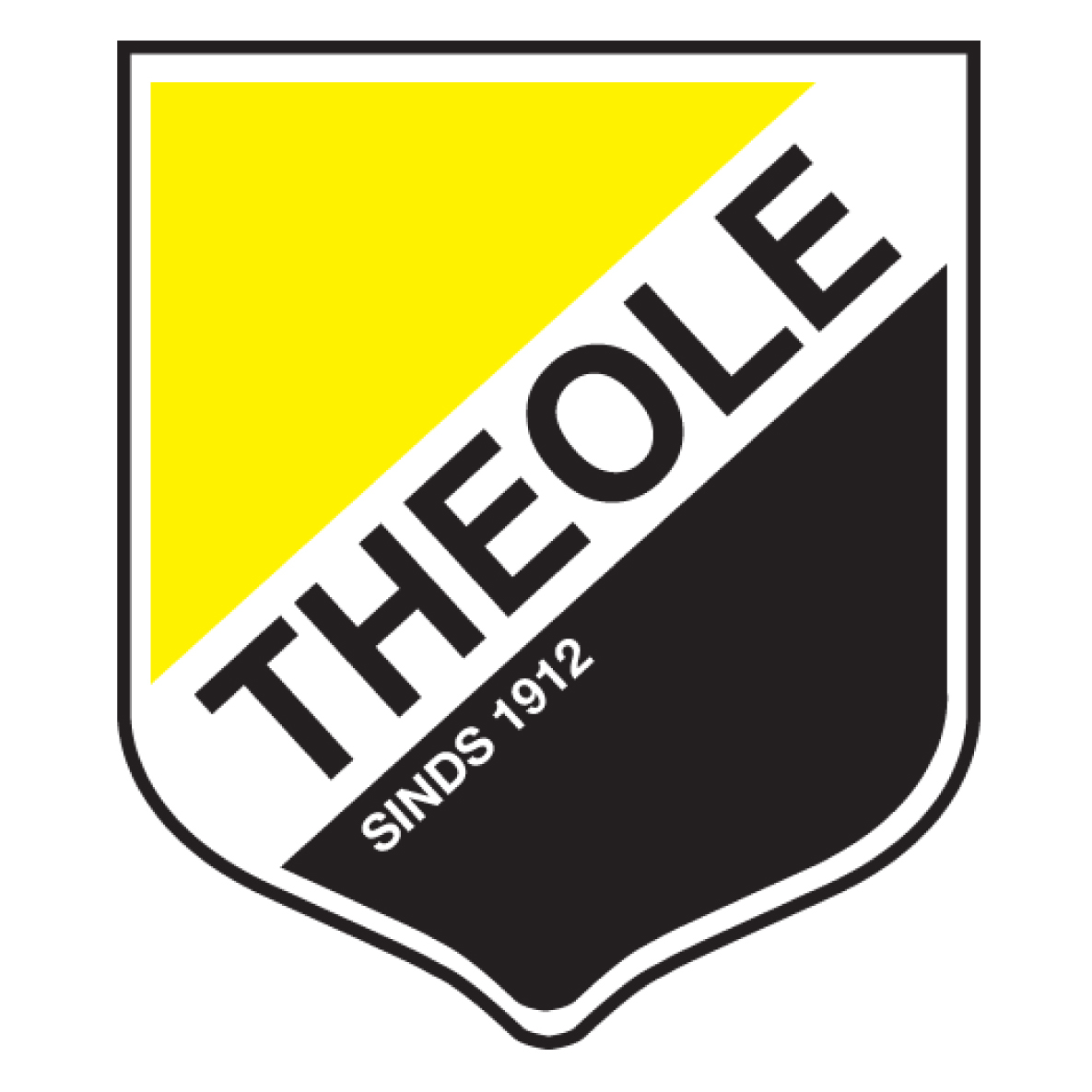 Logo van T.S.V. Theole